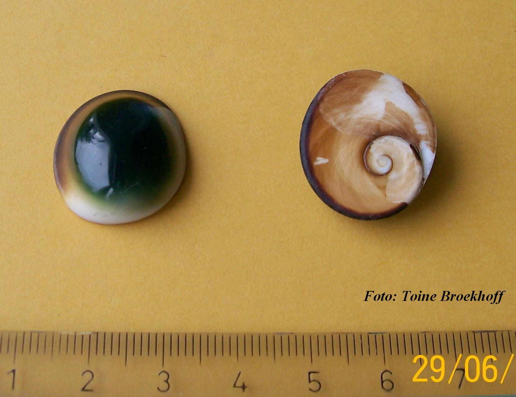 Mata Biak (oog van Biak)